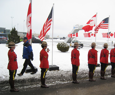 RCMP at President Obama's Arrival